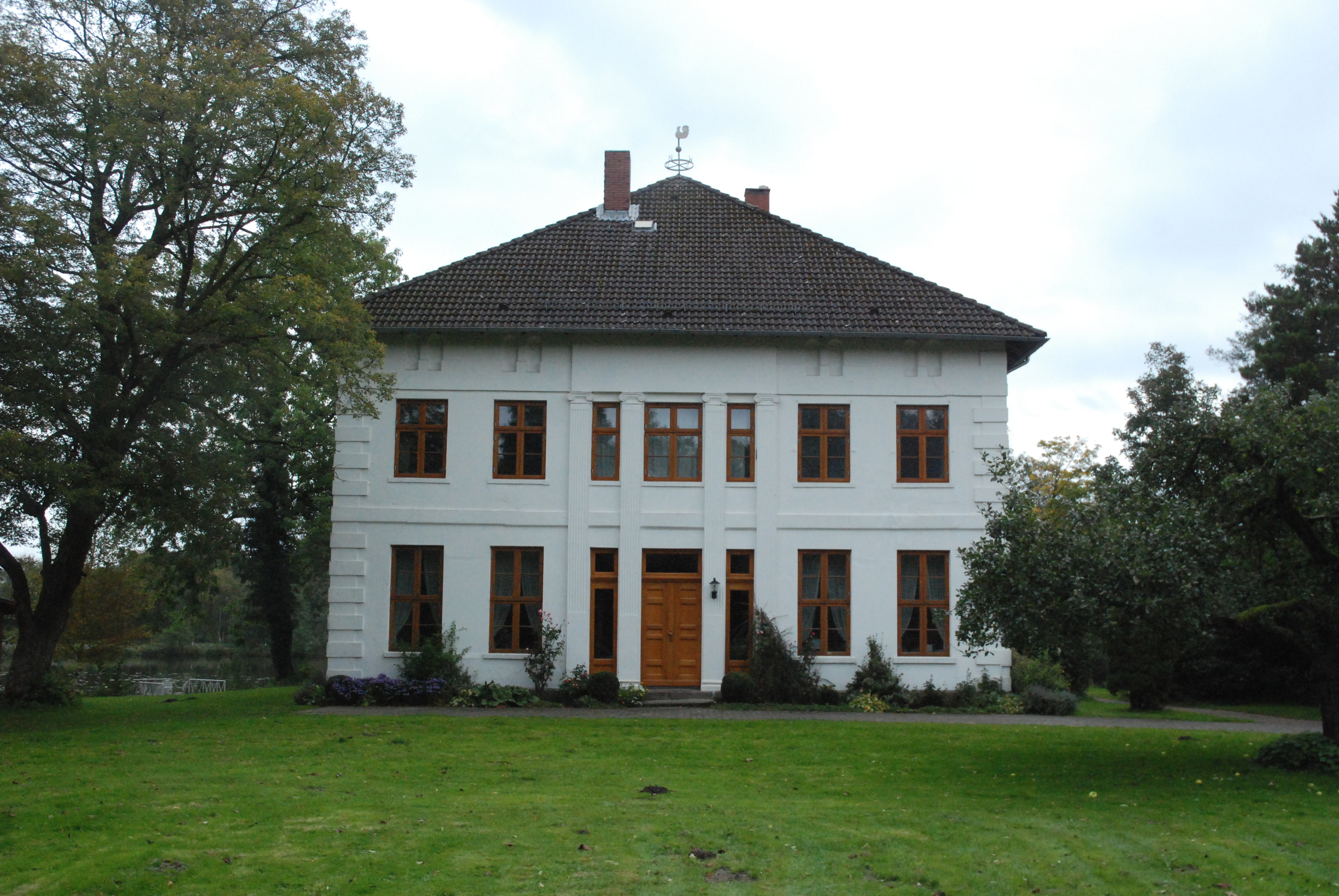 Gutshaus